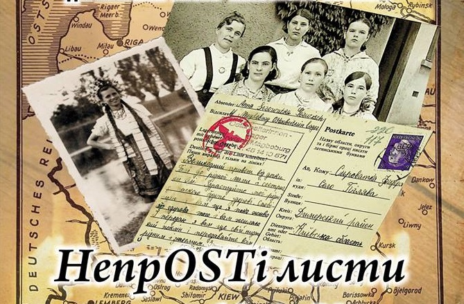 афіша проекту «НепрOSTі листи»